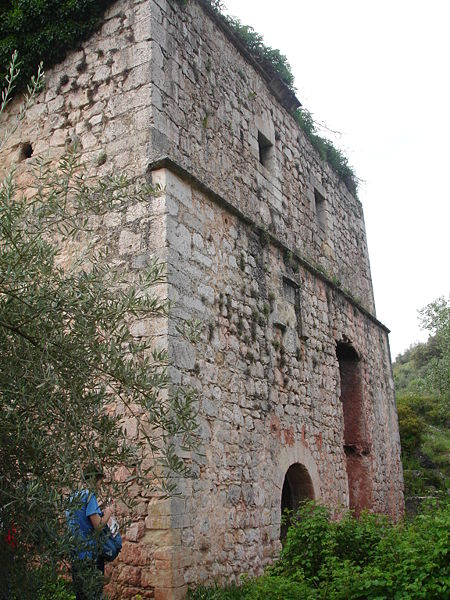 El Molino del Cubo, a menos de 2km del núcleo urbano de Torredonjimeno.